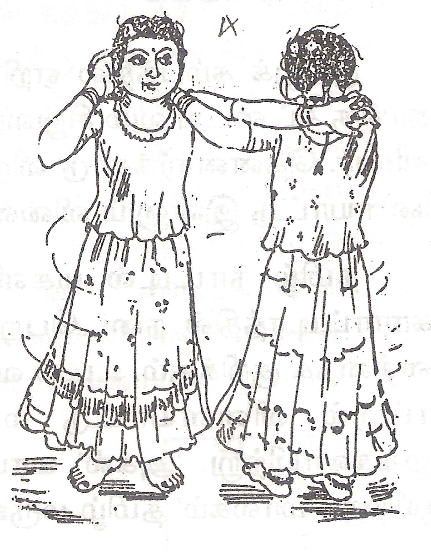 Game “Raattu-Puutu, ராட்டு-பூட்டு, is a game of Tamil-Nadu, India played in rural areas. The image was taken from my own source, a book written by me, Vanishing-Game , Maraikindra Vilaiyaattugal. மறைகின்ற விளையாடுகள், 2002